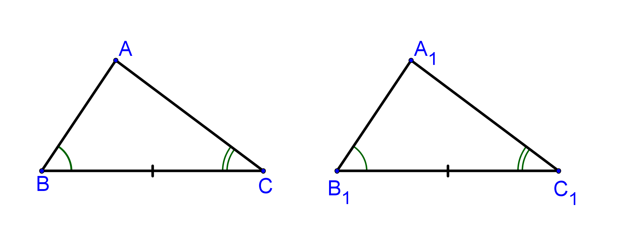 файл создан в среде GeoGebra